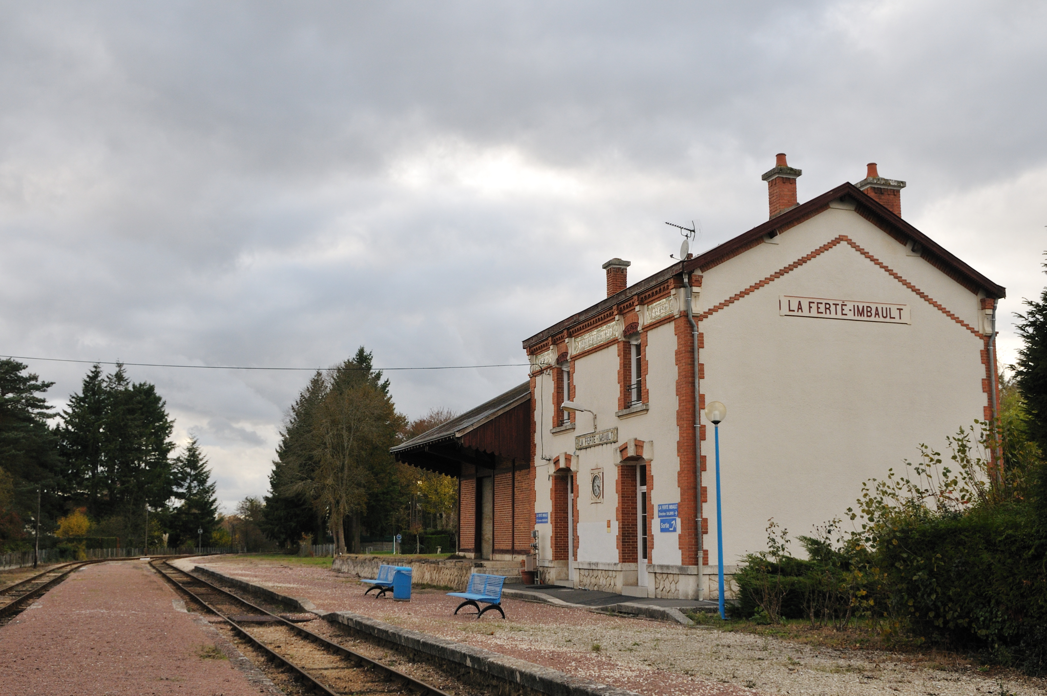 Gare de La Ferté-Imbault, Loir-et-Cher, France